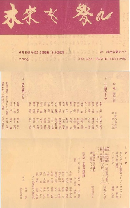 1959年6月15日に、銀座山葉ホールで開催された歴程祭「未来を祭れ」のパンフレット。